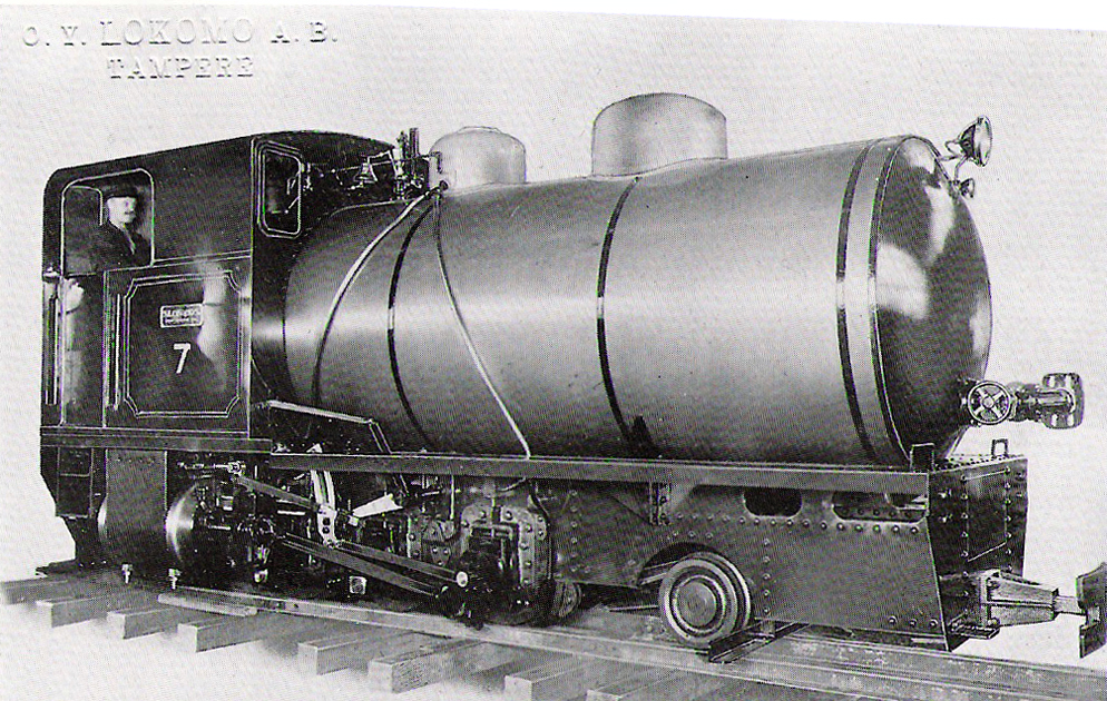 Lokomon höyrysäiliöveturi, Kaukas 7